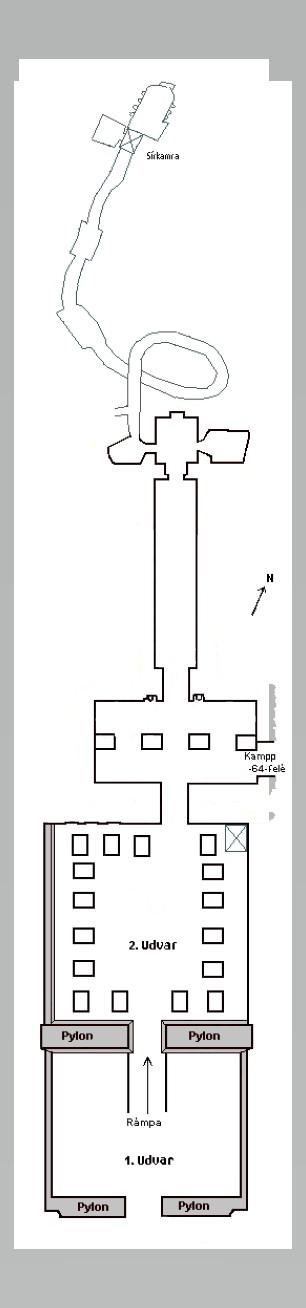 TT32 alaprajz